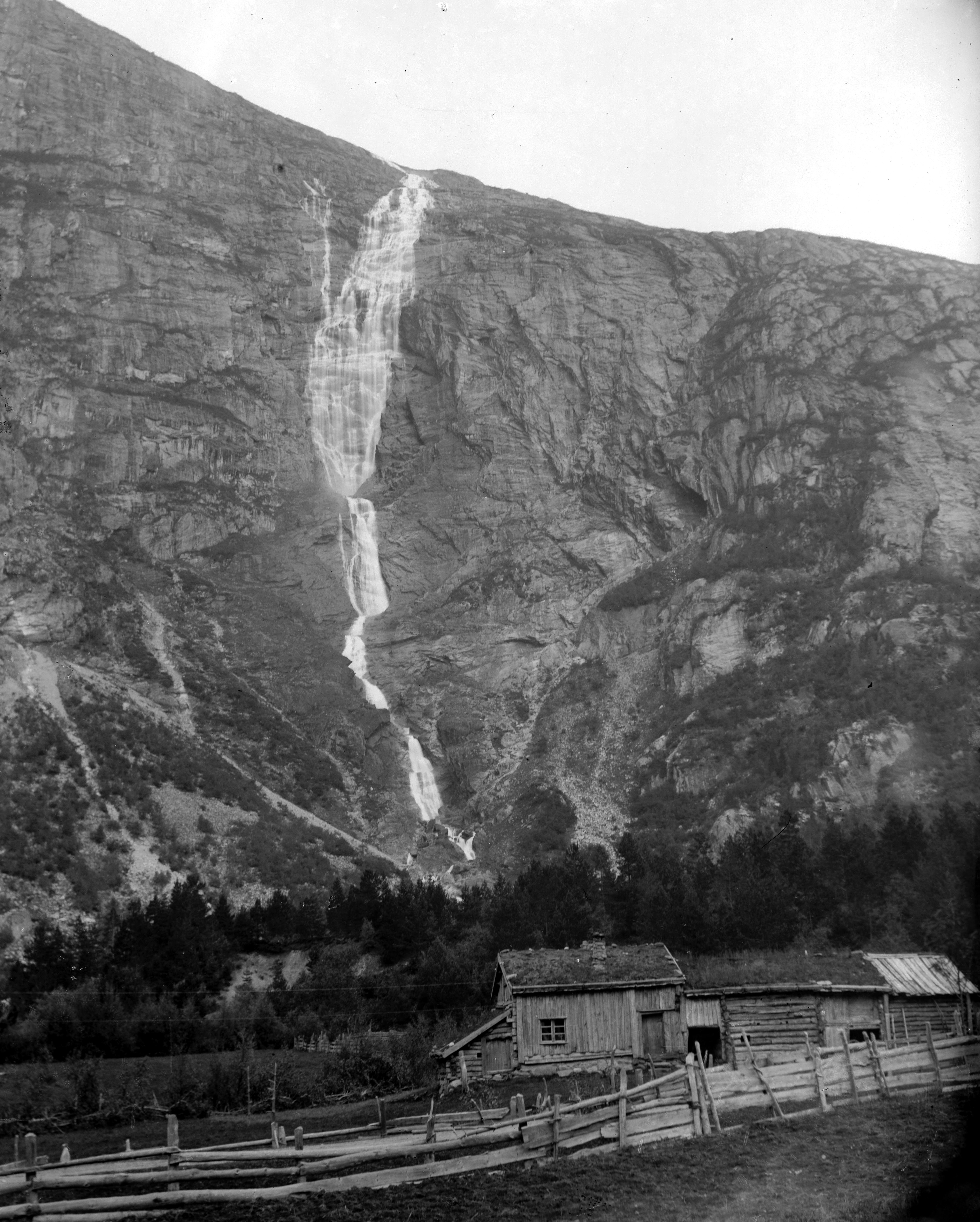 Påskrift negativ: 327 Grytten [Riksantikvaren] Påskrift konvolutt: B-327 Grytten et gårdsbruk ved Mongefossen [Riksantikvaren] Sted: Mongefossen Kommune: Rauma Fylke: Møre og Romsdal Tagger: landskap foss gård